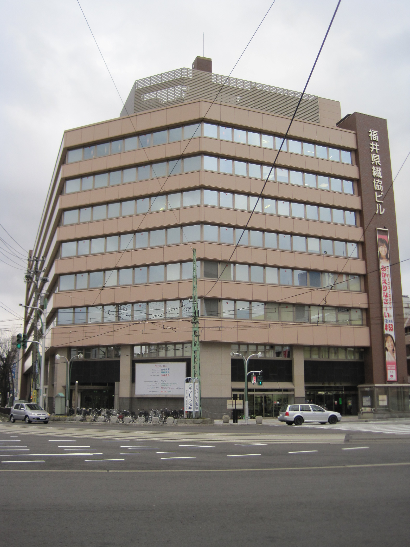 京福バスターミナルが入居する福井県繊協ビル